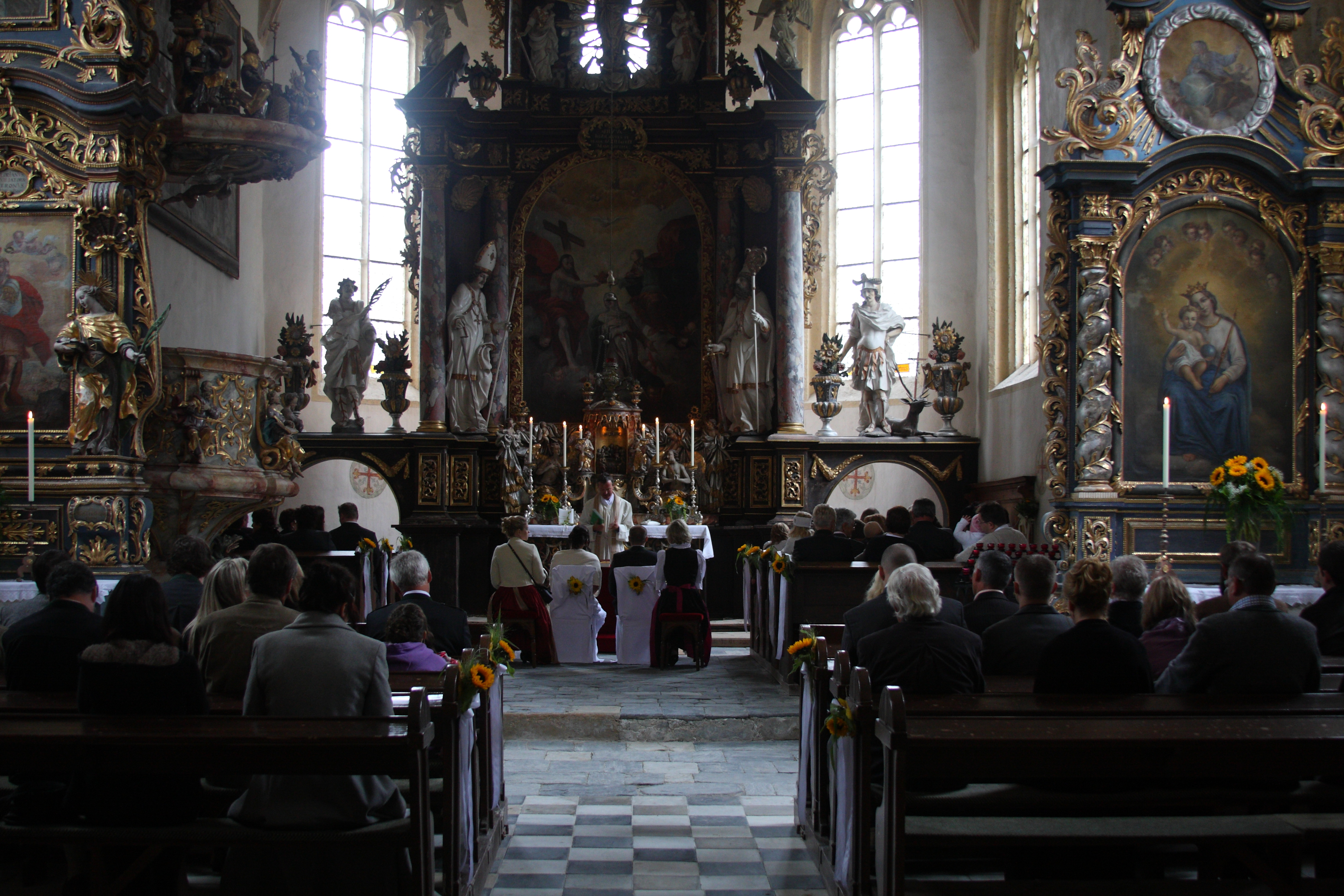 Kath. Filialkirche hl. Margaretha, Oberhaus, Steiermark Austria